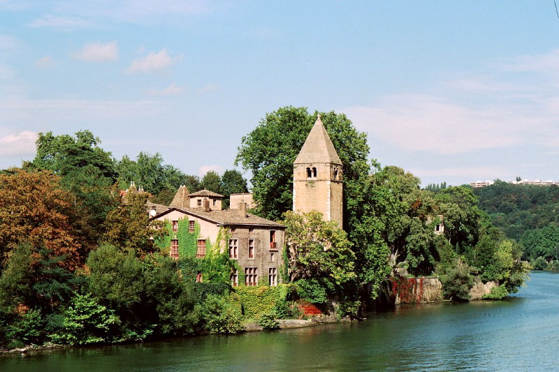 Vue du côté Est de l'île Barbe à Lyon (France)